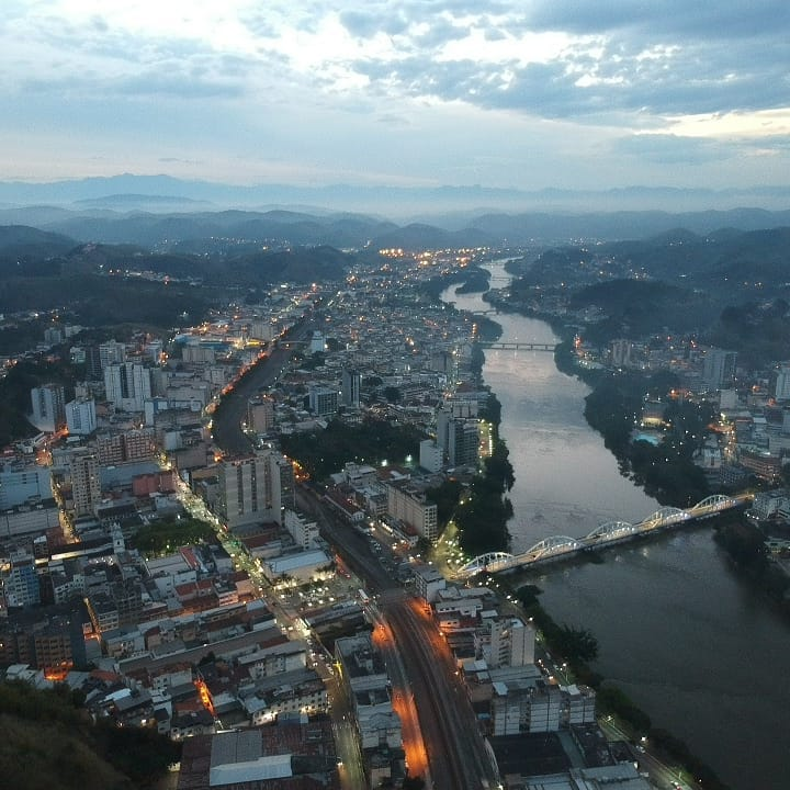 Barra Mansa (vista aérea)